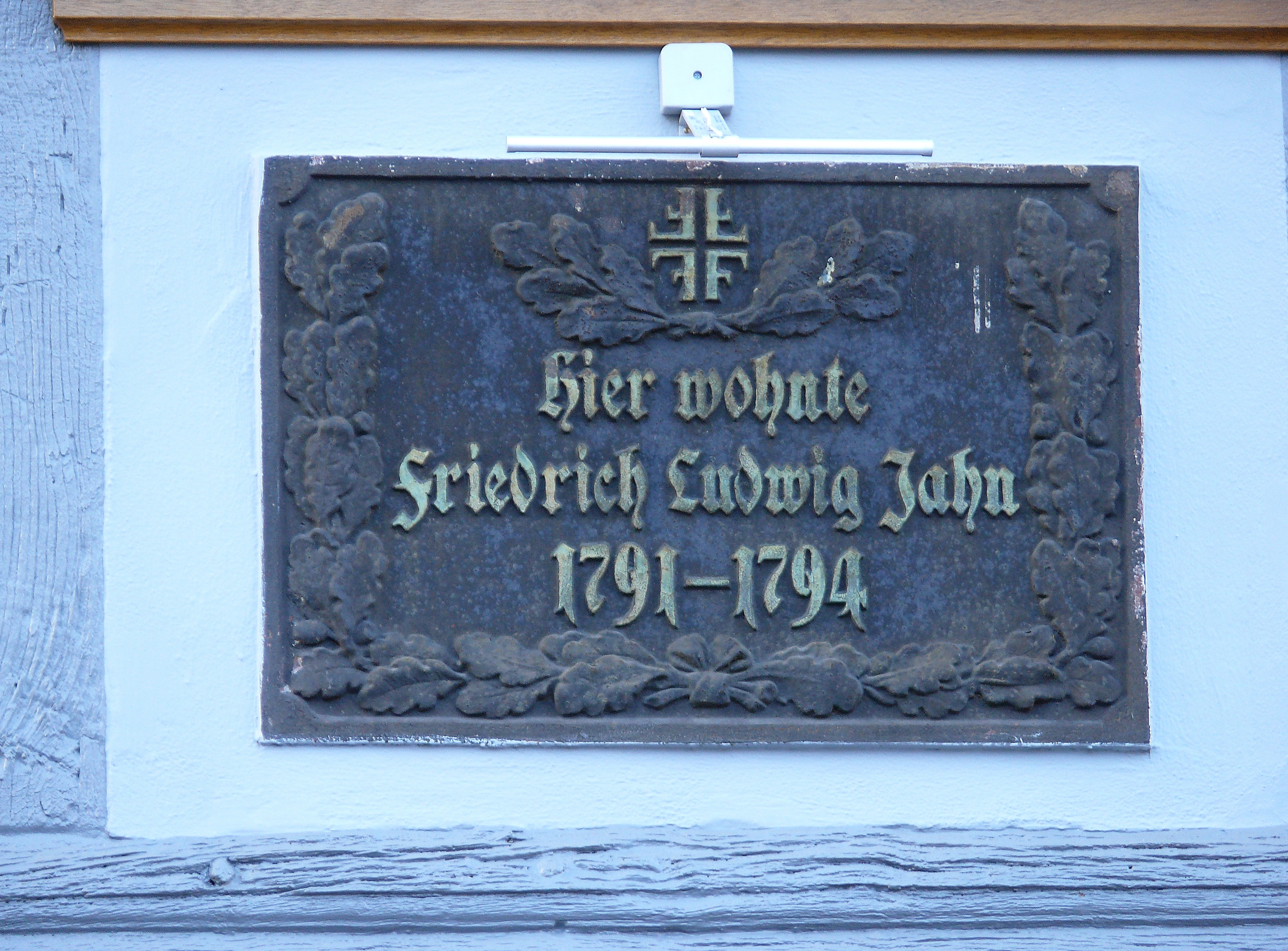 Gedenktafel zu Ehren von Friedrich Ludwig Jahn, am Gebäude Jenny-Marx-Straße 13 in der Hansestadt Salzwedel.